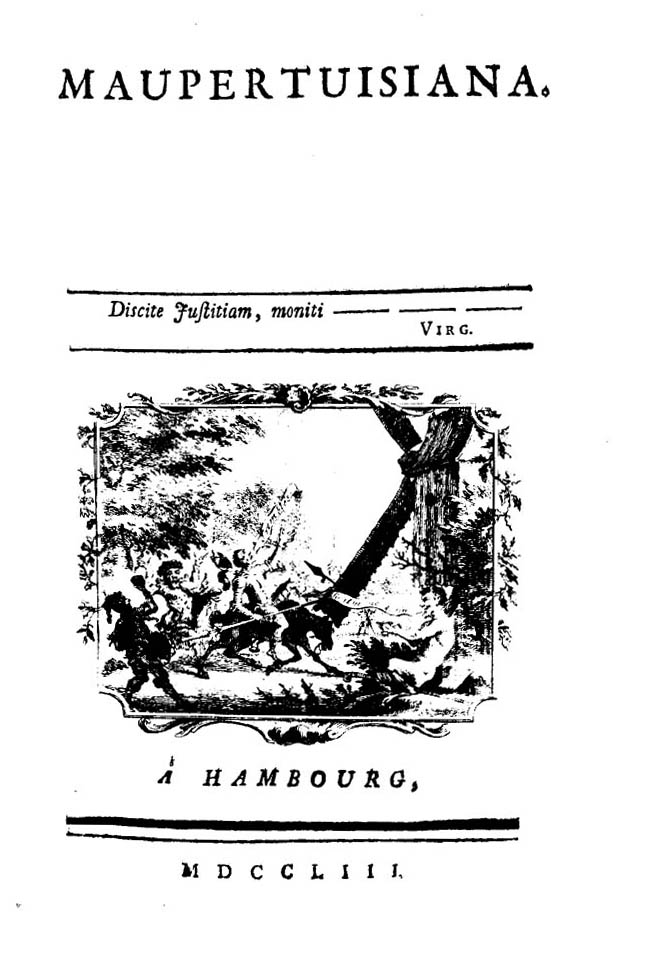 Maupertuisiana. - A Hambourg [i.e. Leiden : Elie Luzac], 1753. - [610] p. in varie sequenze ; 8°. - Raccolta di opere, già edite singolarmente, circa la contesa tra Maupertuis e König. - La disposizione delle singole opere varia in esemplari diversi .